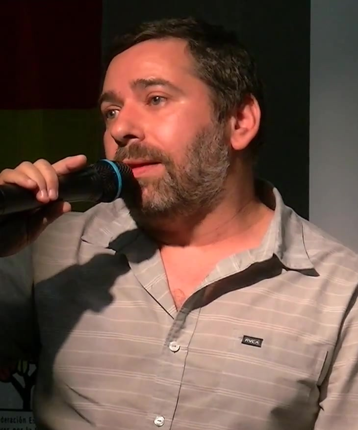 Primarias abiertas a simpatizantes de Izquierda Unida de Madrid. El 7 de Noviembre Tania Sánchez y Mauricio Valiente presentaron su candidatura en el Ateneo Republicano de Vallecas, acompañados de Javier Couso y María Espìnosa